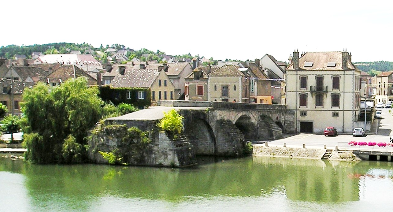 Pont-sur-Yonne, alte Brücke